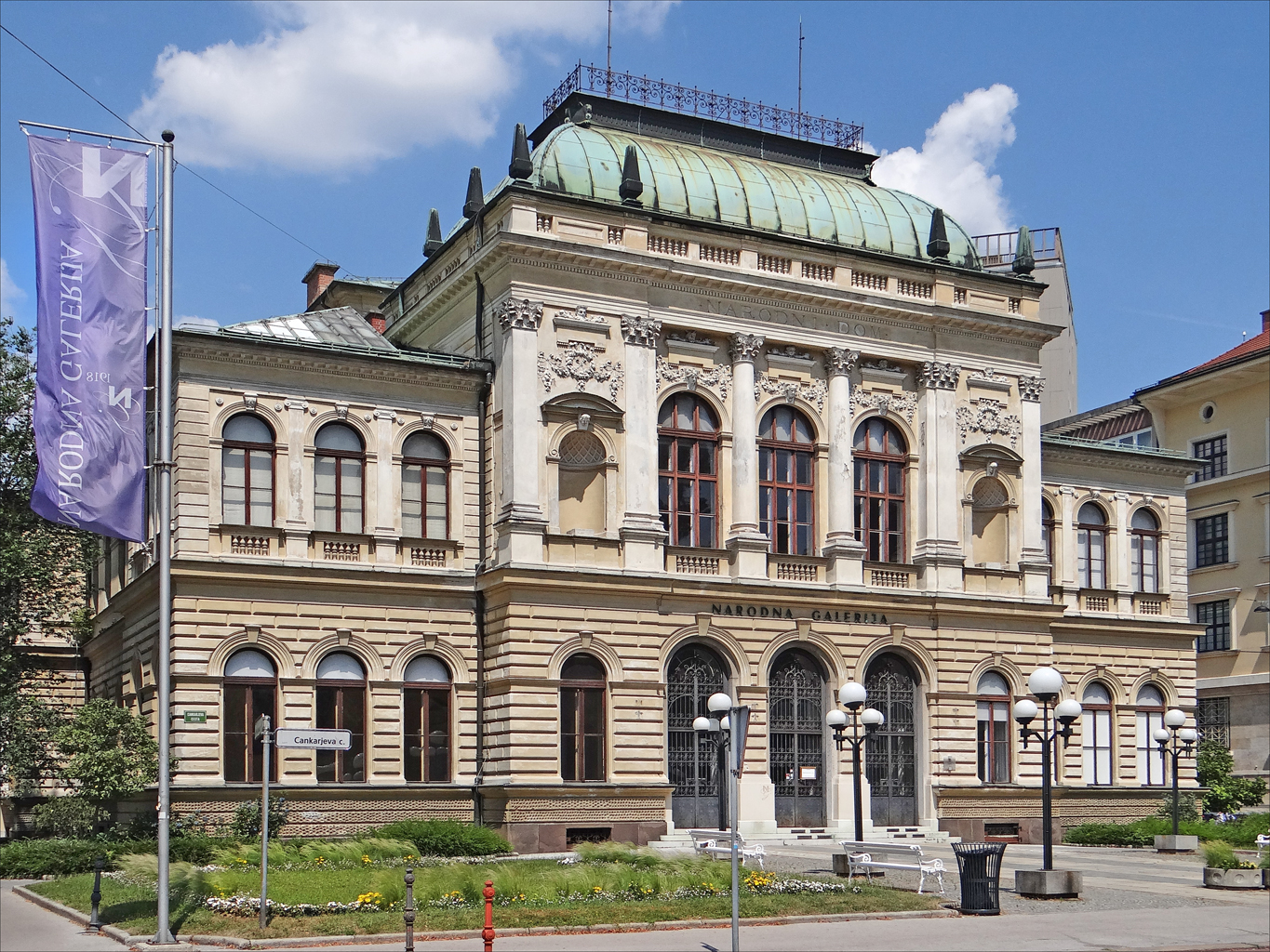 La façade de la galerie nationale La Galerie nationale est la principale galerie slovène d'art ancien. Elle abrite la plus grande collection d'oeuvres artistiques du Haut Moyen Âge au XXe siècle. Site officiel